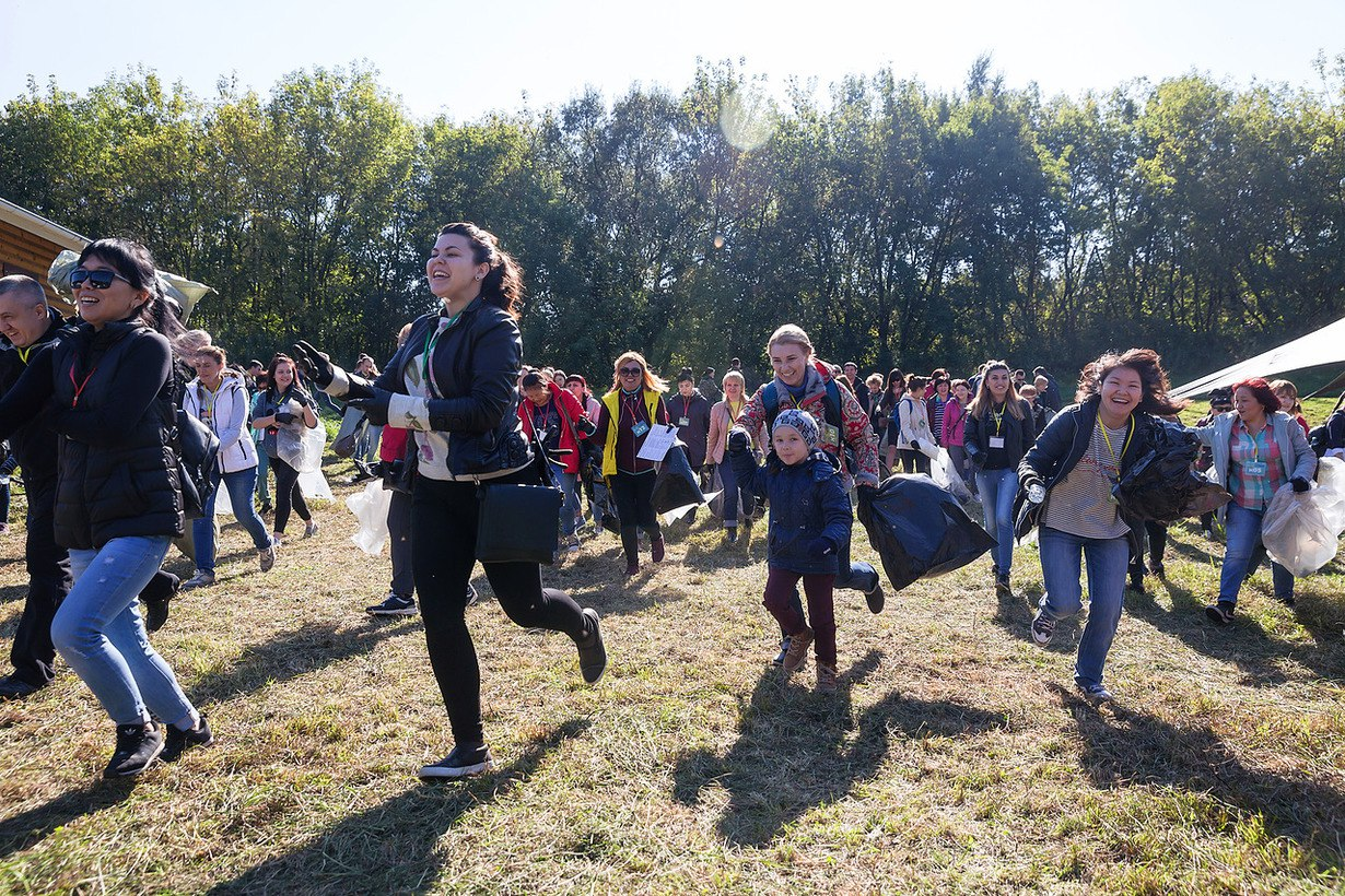 Забег, начало экоквеста